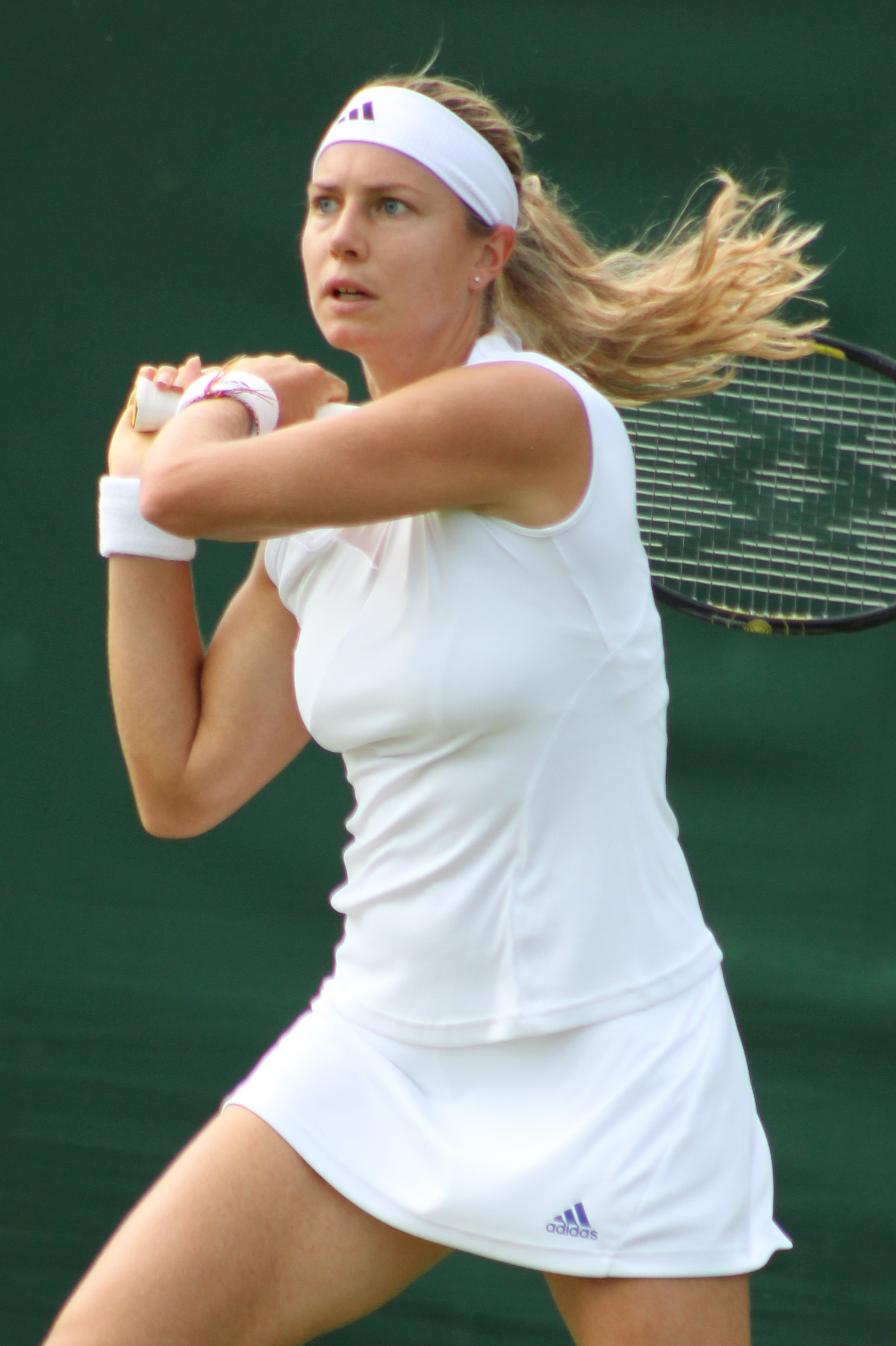 Voegele WM14 (4)